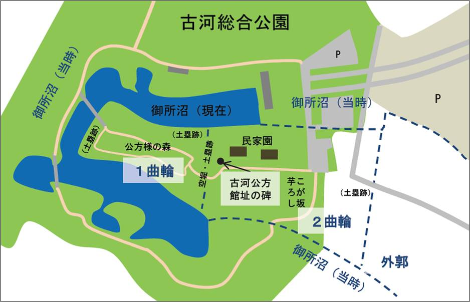 茨城県古河市の古河総合公園内にある古河公方館跡地の概説図。『古河市史資料第10集 古河城・鴻巣館 ─遺構調査・発掘調査報告書─』、古河市（1985年） の解説をもとにして作成。